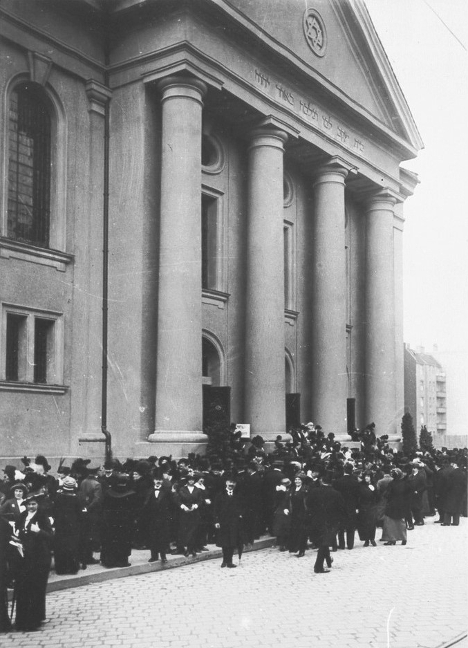 Synagoge Levetzowstraße Frontansicht ca. 1914